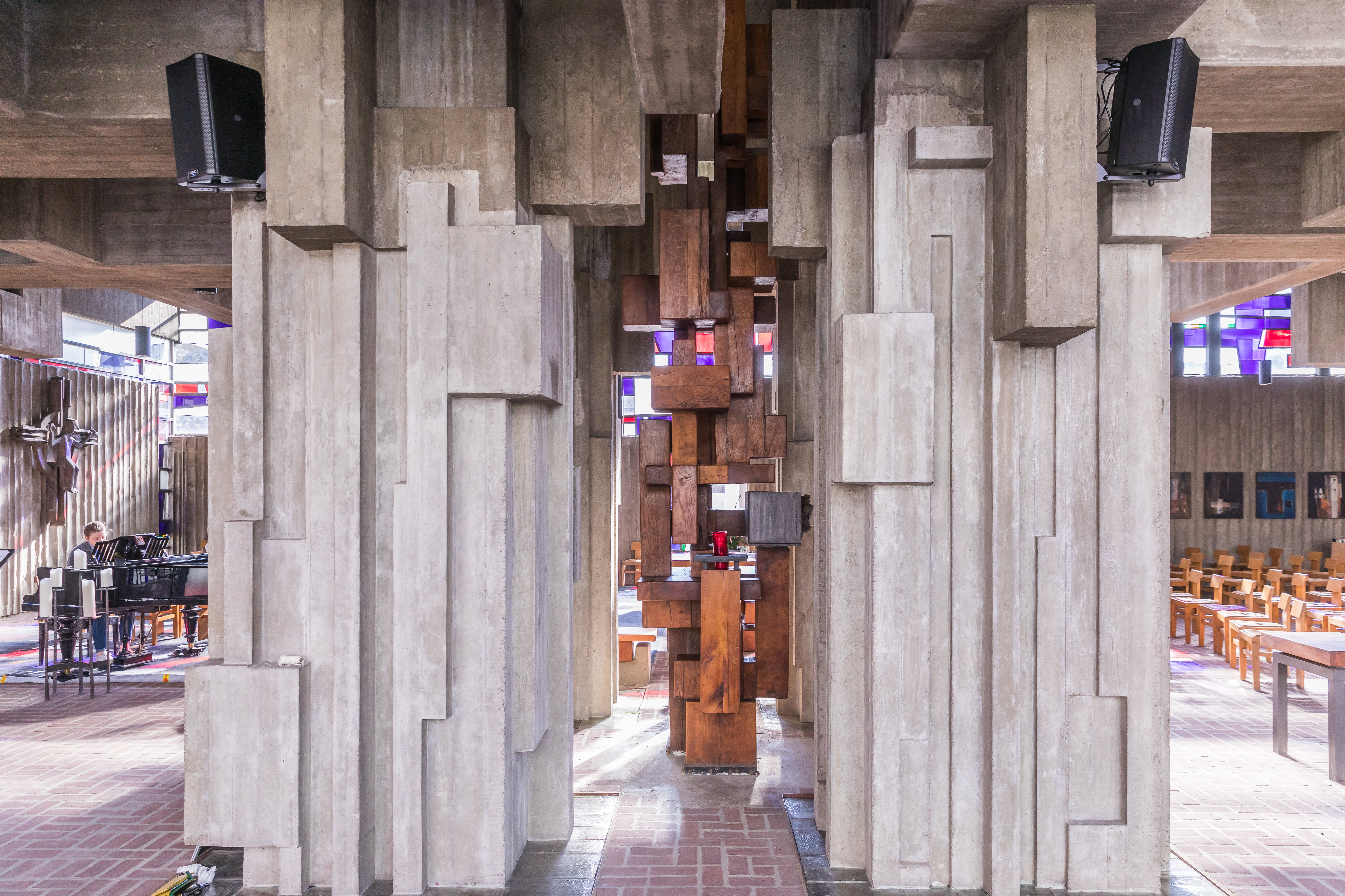 Kirche Johannes XXIII., Katholische Hochschulgemeinde Köln